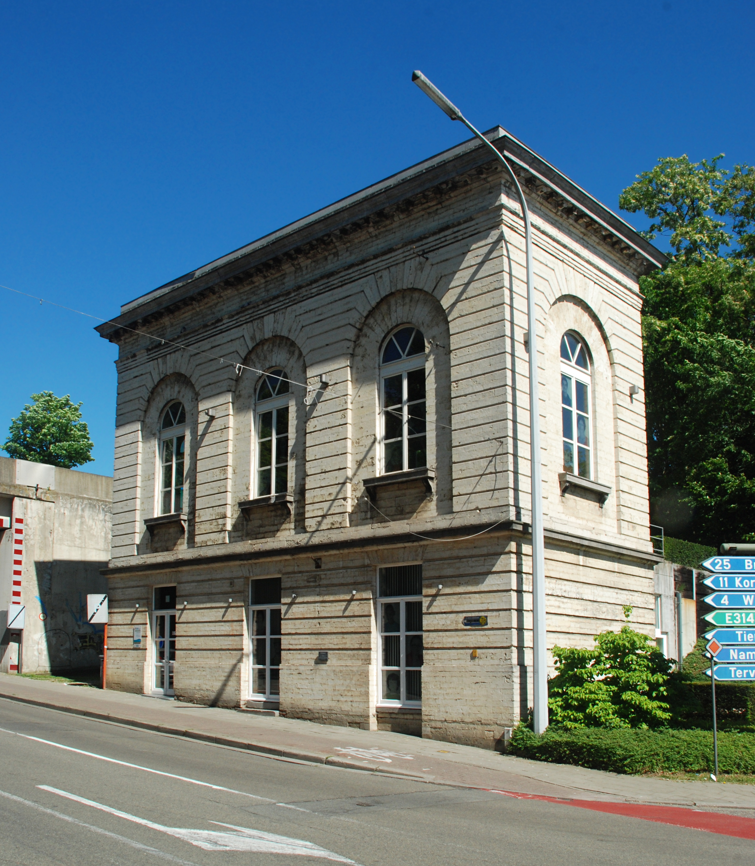 Belgique - Brabant flamand - Louvain - Porte de Bruxelles (néo-classique 1825, architecte Martin Hensmans)